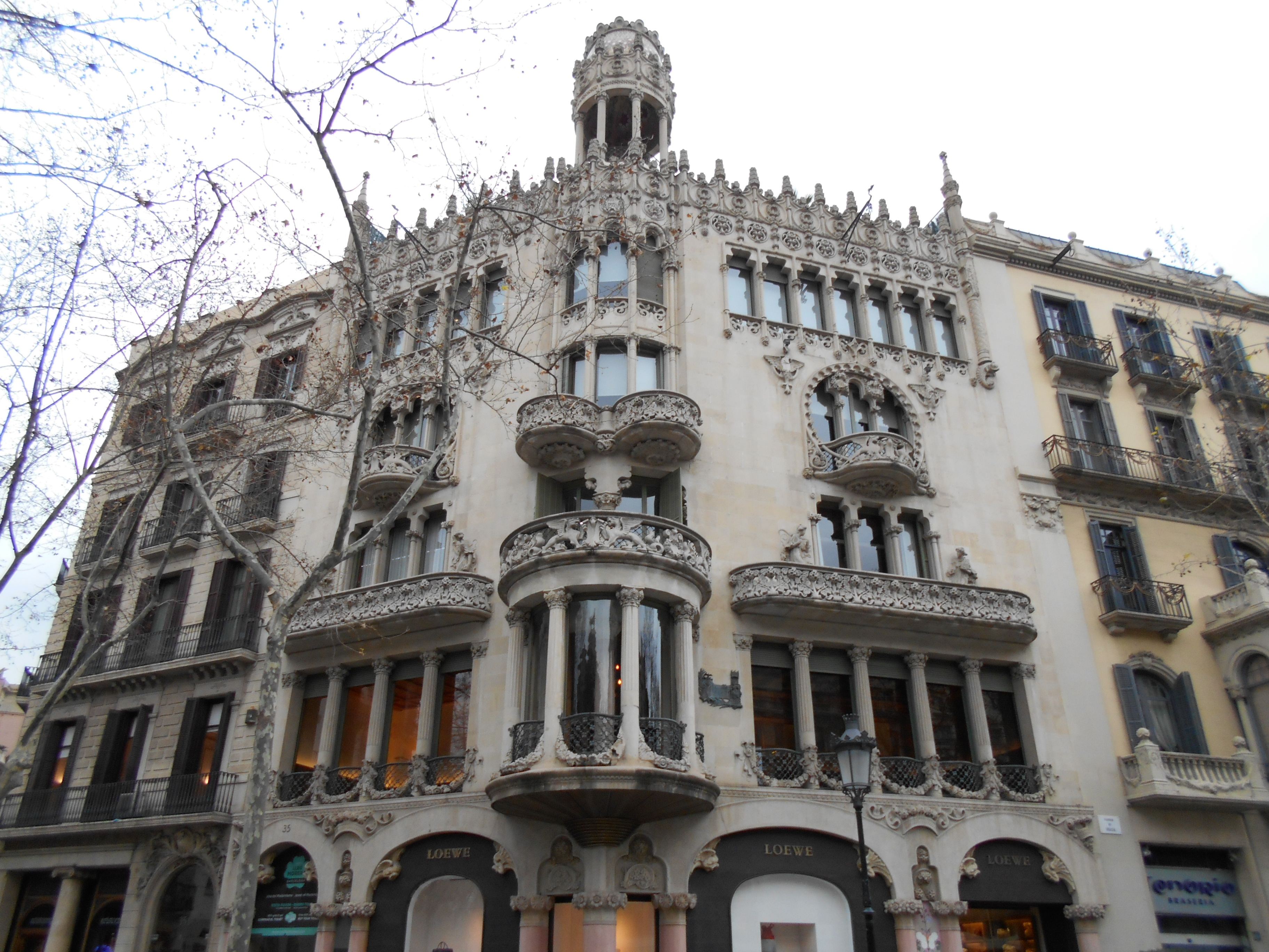 Casa Lleó Morera, Lluís Domènech i Montaner.